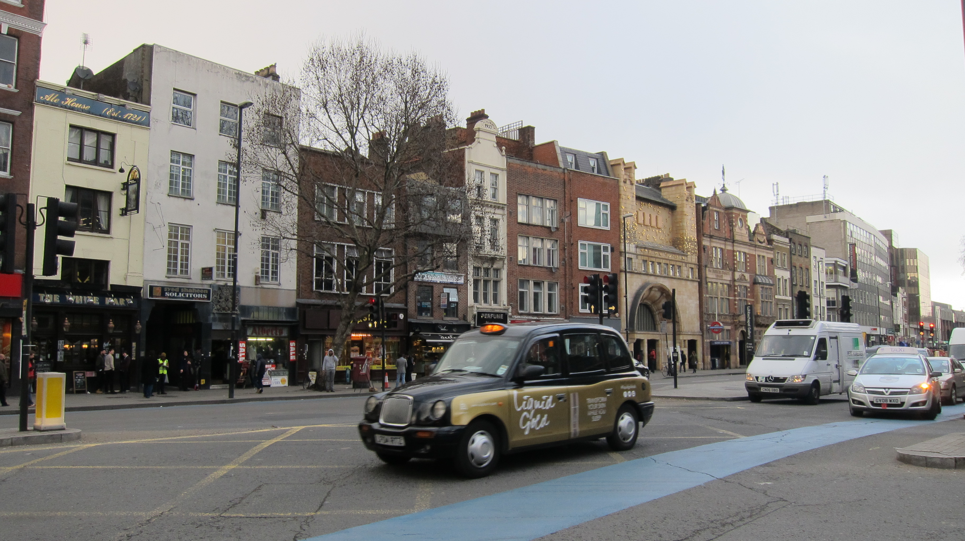 London